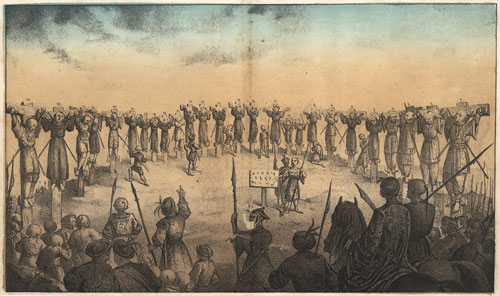 Cruxifixion of 26 Christians in Nagasaki, Japan, 5 February 1597 Eustaquio Maria de Nenclares: Vidas de los mártires del Japon, San Pedro Bautista, San Martin de la Ascension, San Francisco Blanco y San Francisco de San Miguel, todos de la Órden de San Francisco, Naturales de España, seguida de una reseña biográfica de los 22 restantes no españoles, y la de San Miguel de los Santos.... Madrid: Imprenta de la Esperanza, Antonio Perez Dubrull, 1862